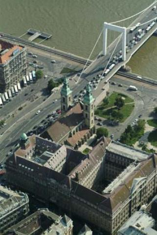 A plébániatemplom légifotója.